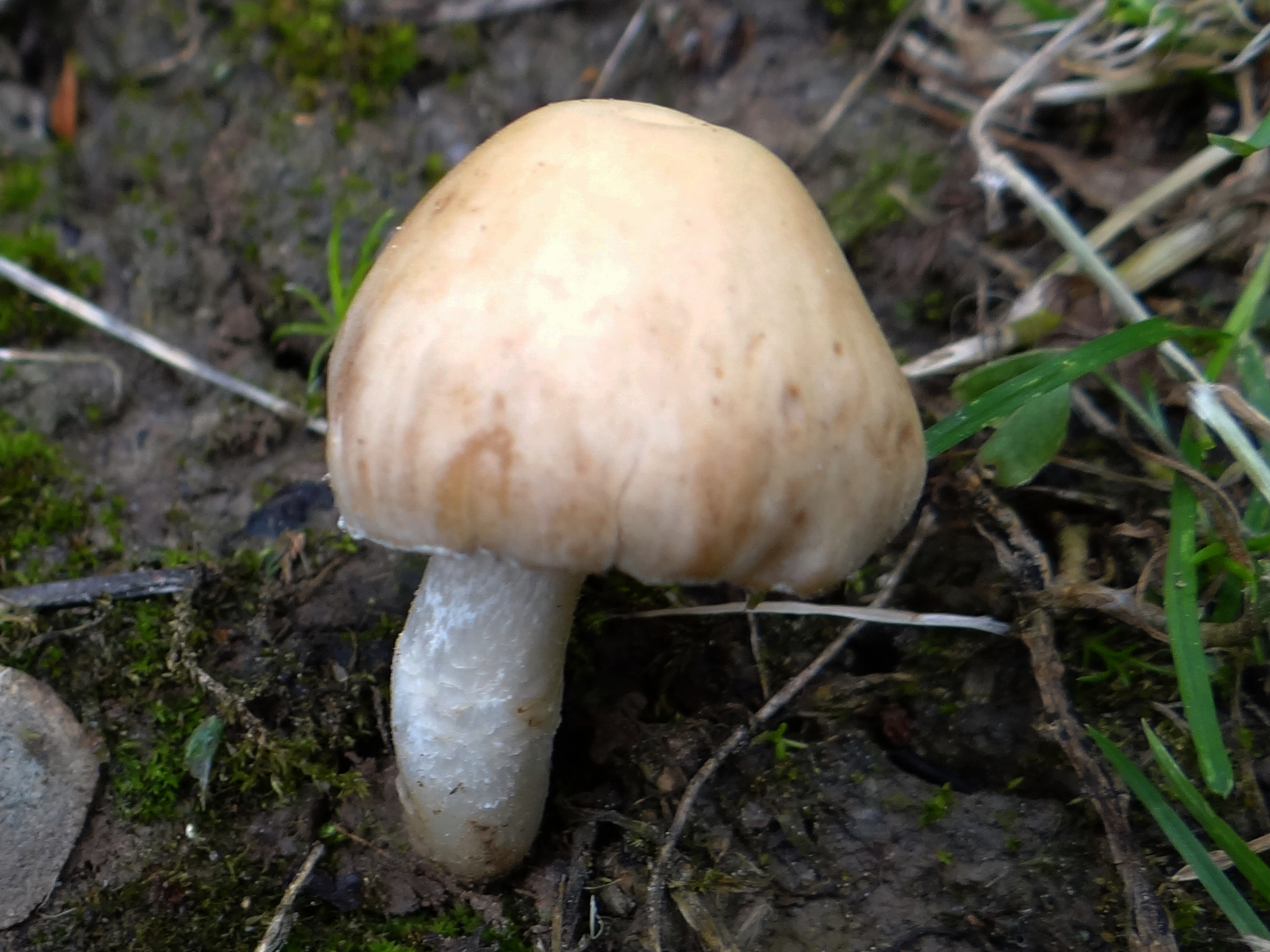 Pluteus petasatus (location: Poland)